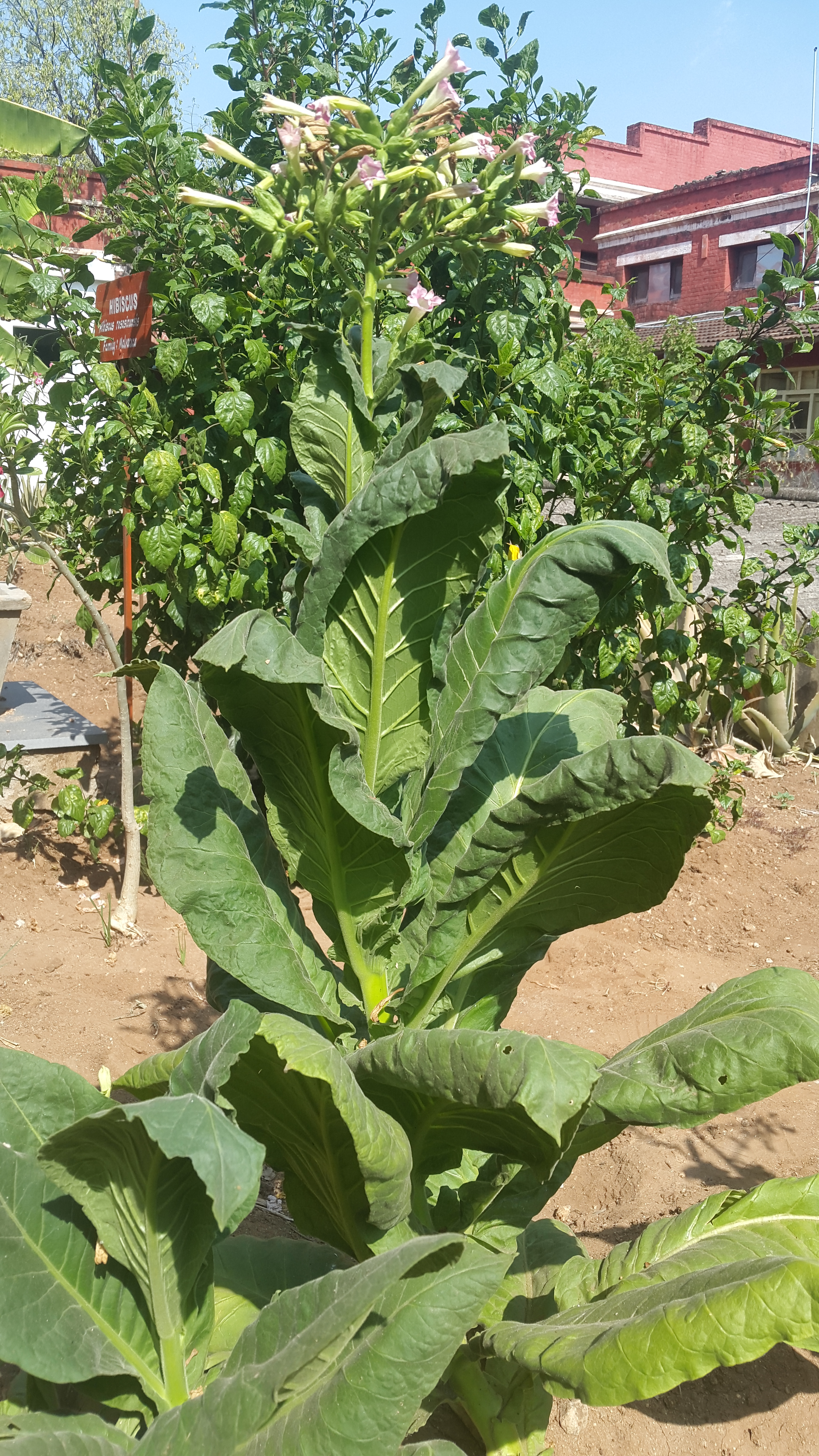 Scietific name:Nicotiana tobacum